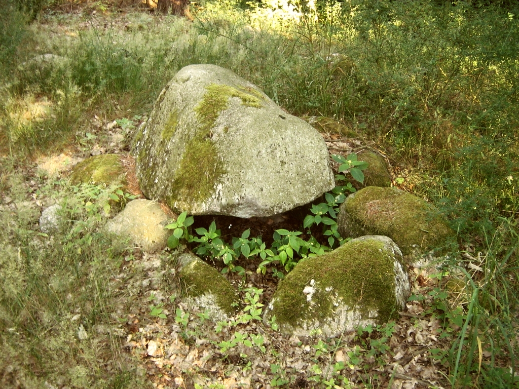 Ein Grab der Jungsteinzeit (2500 v. Ch. - Trichterbecherkultur). Dieser Urdolmen gehört zur ältesten Bauform der Großsteingräber. Er war für nur einen Toten gedacht. Ein schwach trapezförmiges Hünenbett, das teilweise erhalten ist, grenzt das Grab ab und hebt es hervor. (bei Neubarkvieren im Dammerstorfer Wald, Gemeinde Dettmannsdorf, Landkreis Nordvorpommern, Mecklenburg)). 1959 wurde der Fund des geplünderten Grabes bekannt. Vermessen wurde es von Ewald Schuldt.Object location54° 05′ 48.86″ N, 12° 29′ 02.87″ E